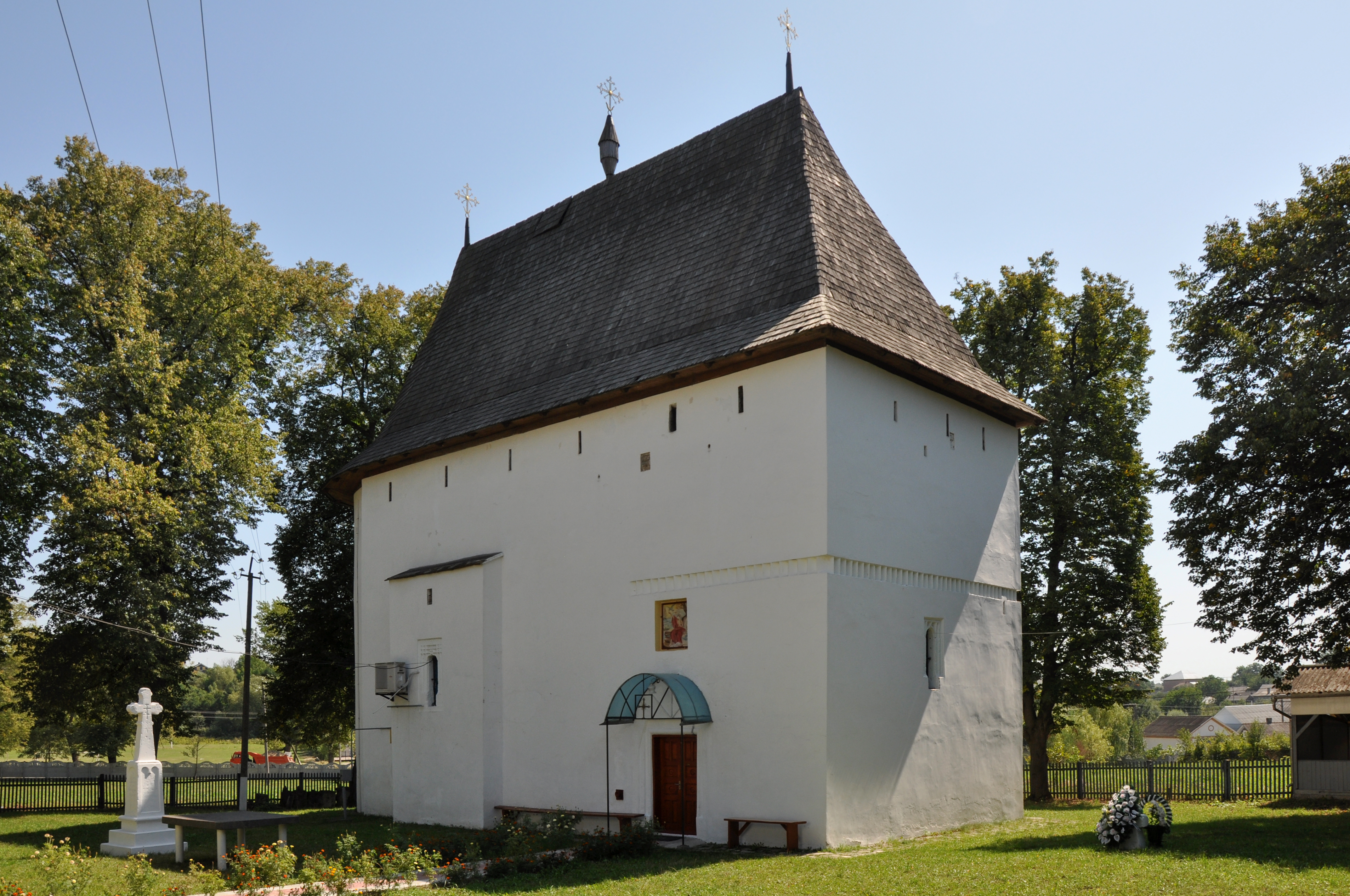 Комплекс Іллінської церкви (мур.), Топорівці